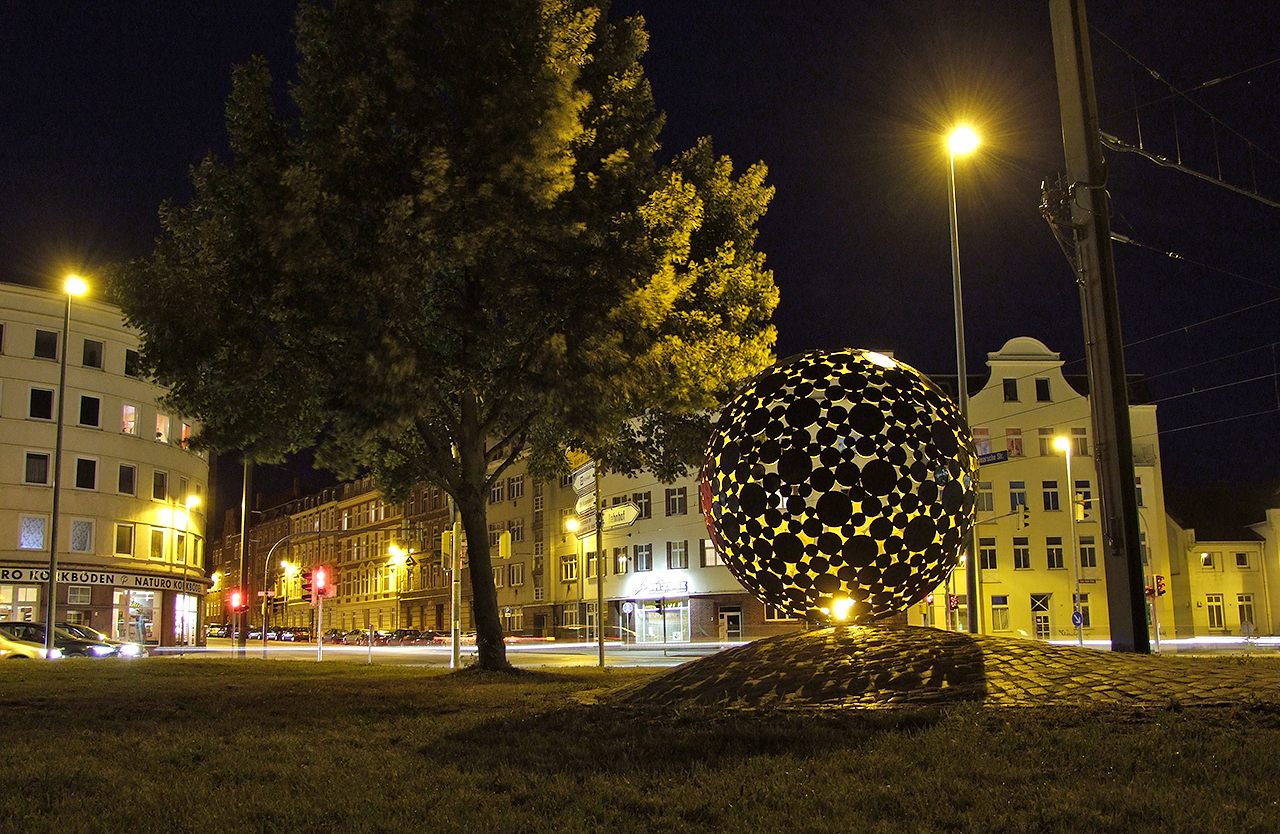 Nächtlicher Blick auf die Kreuzung Wismarsche Straße - Obotritenring in Schwerin.